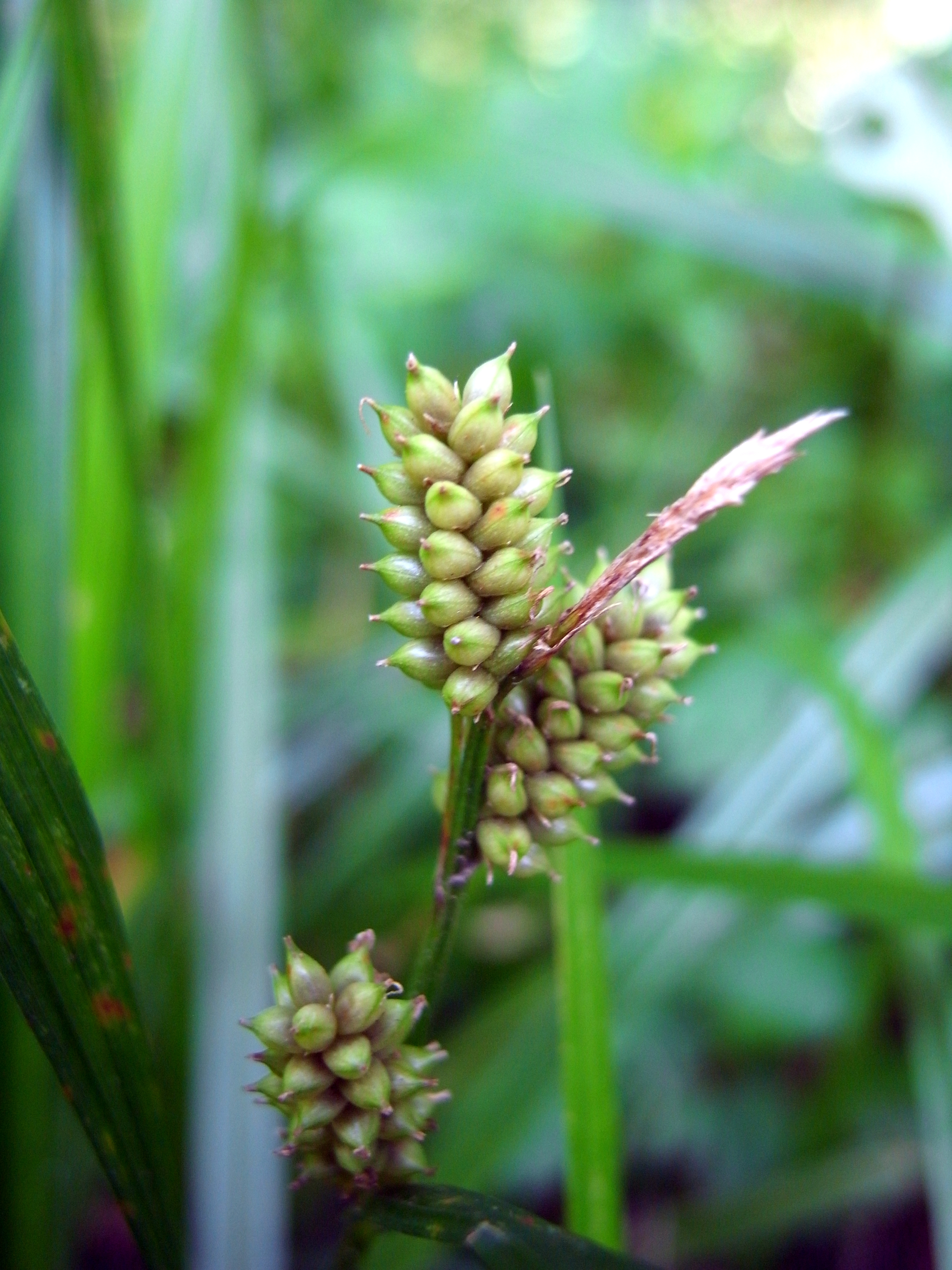 도깨비사초, 정발산에서